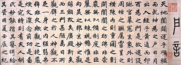 中文（台灣）: 楷書玄妙観重脩三門記巻